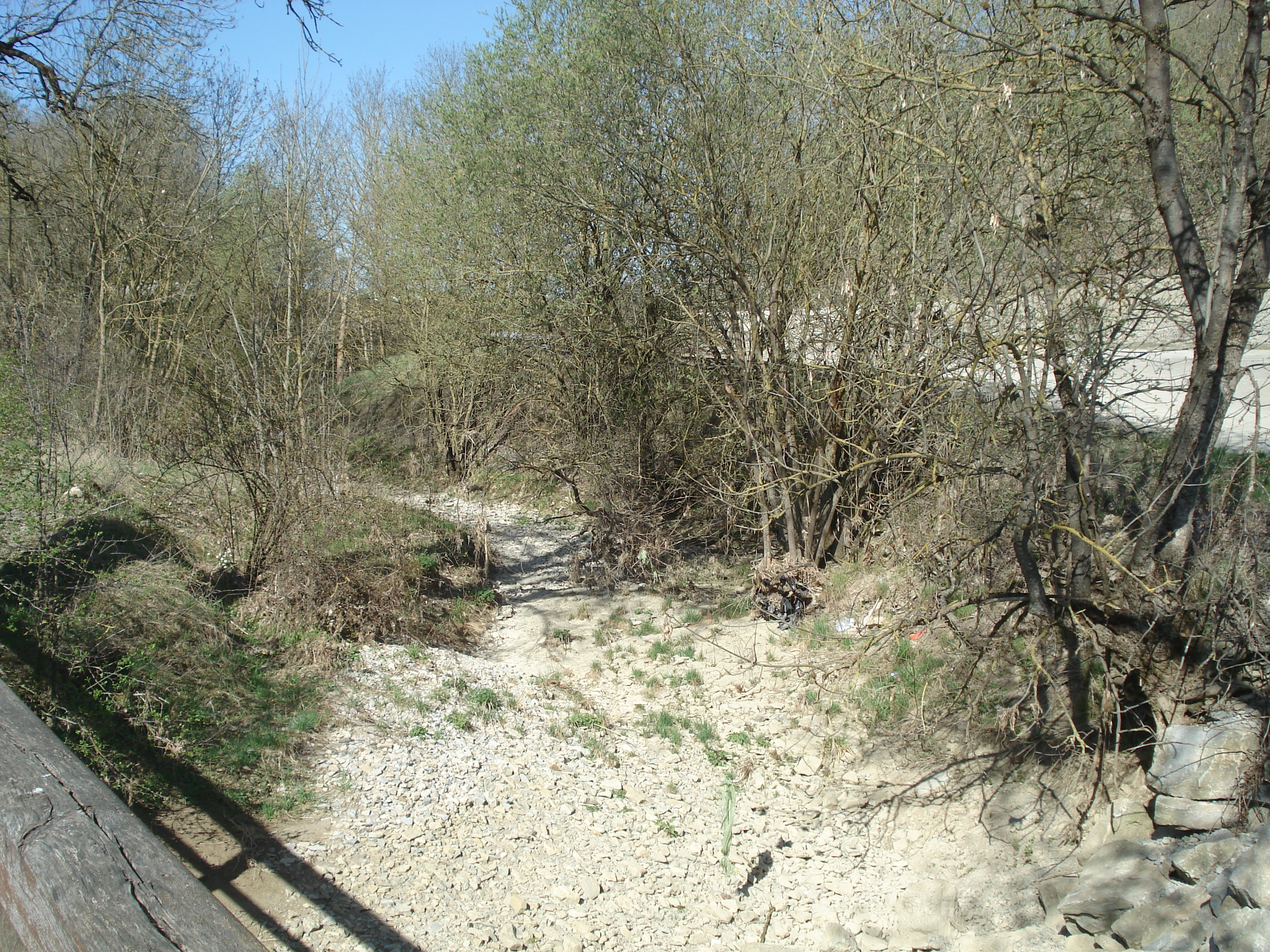 Das trockene Bachbett der oberen Schandtauber vor Bettenfeld